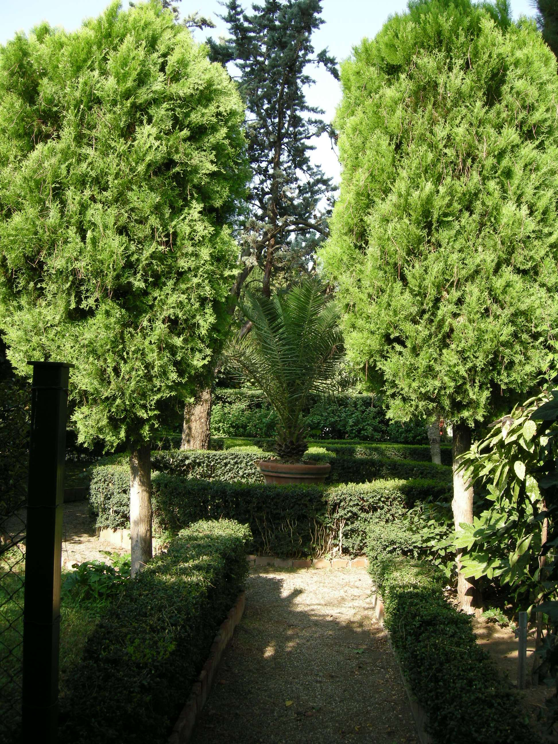 Palazzo rospigliosi pallavicini, giardino